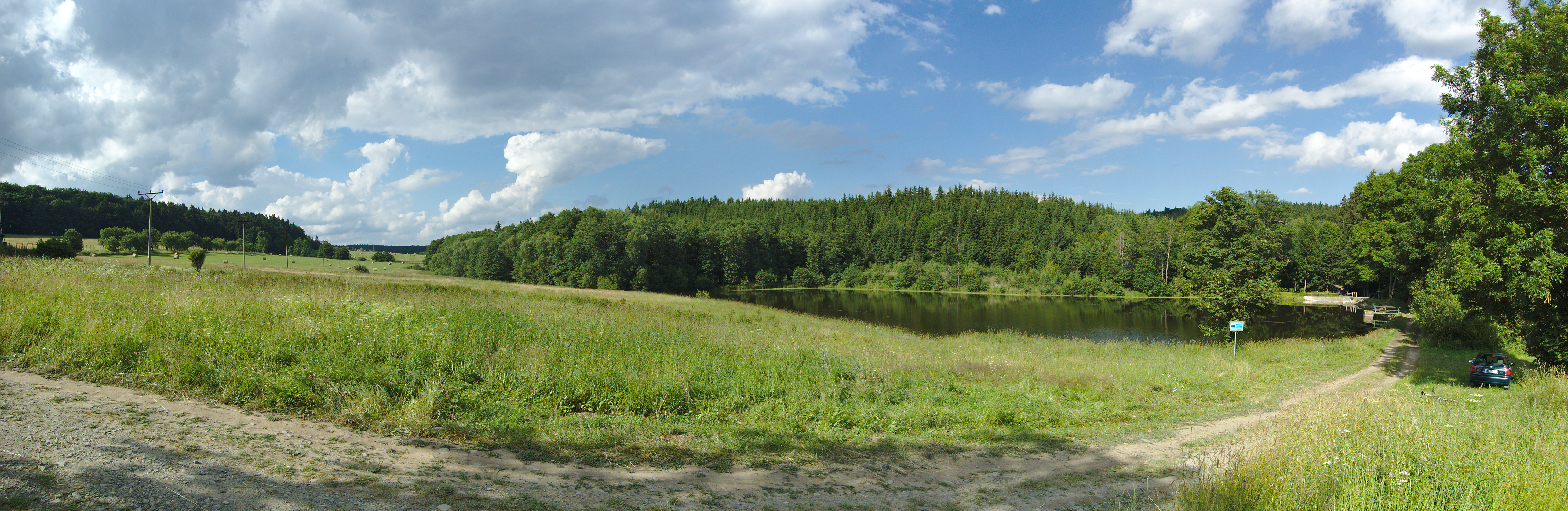 Přírodní rezervace Skelná Huť - panorama rybníku V oboře, Protivanov, okres Prostějov